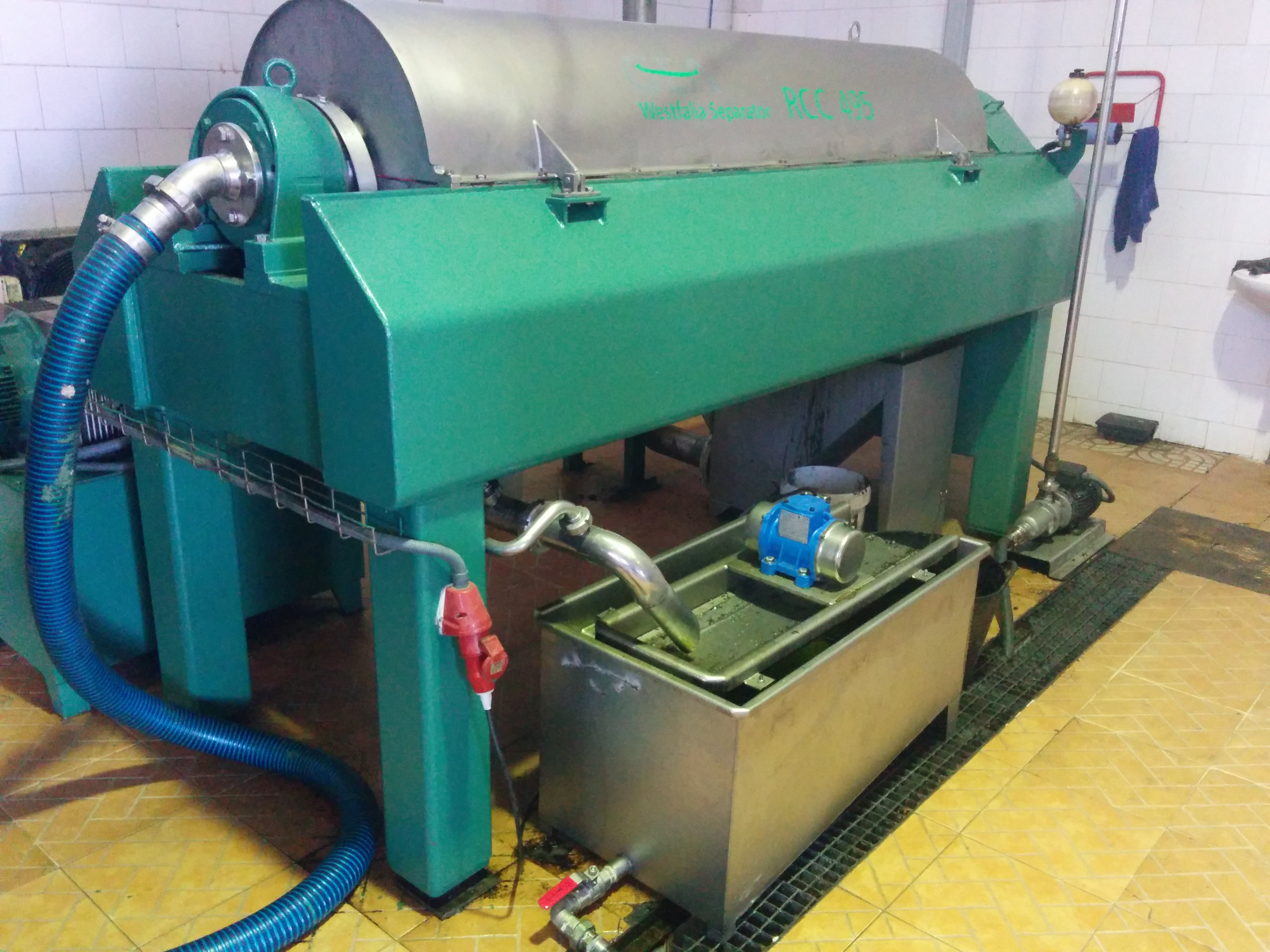 Aceite Oliva Molino Benamejí